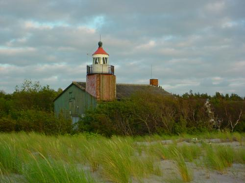 Leuchtfeuer zwischen Wustrow und Dierhagen (Fischland)